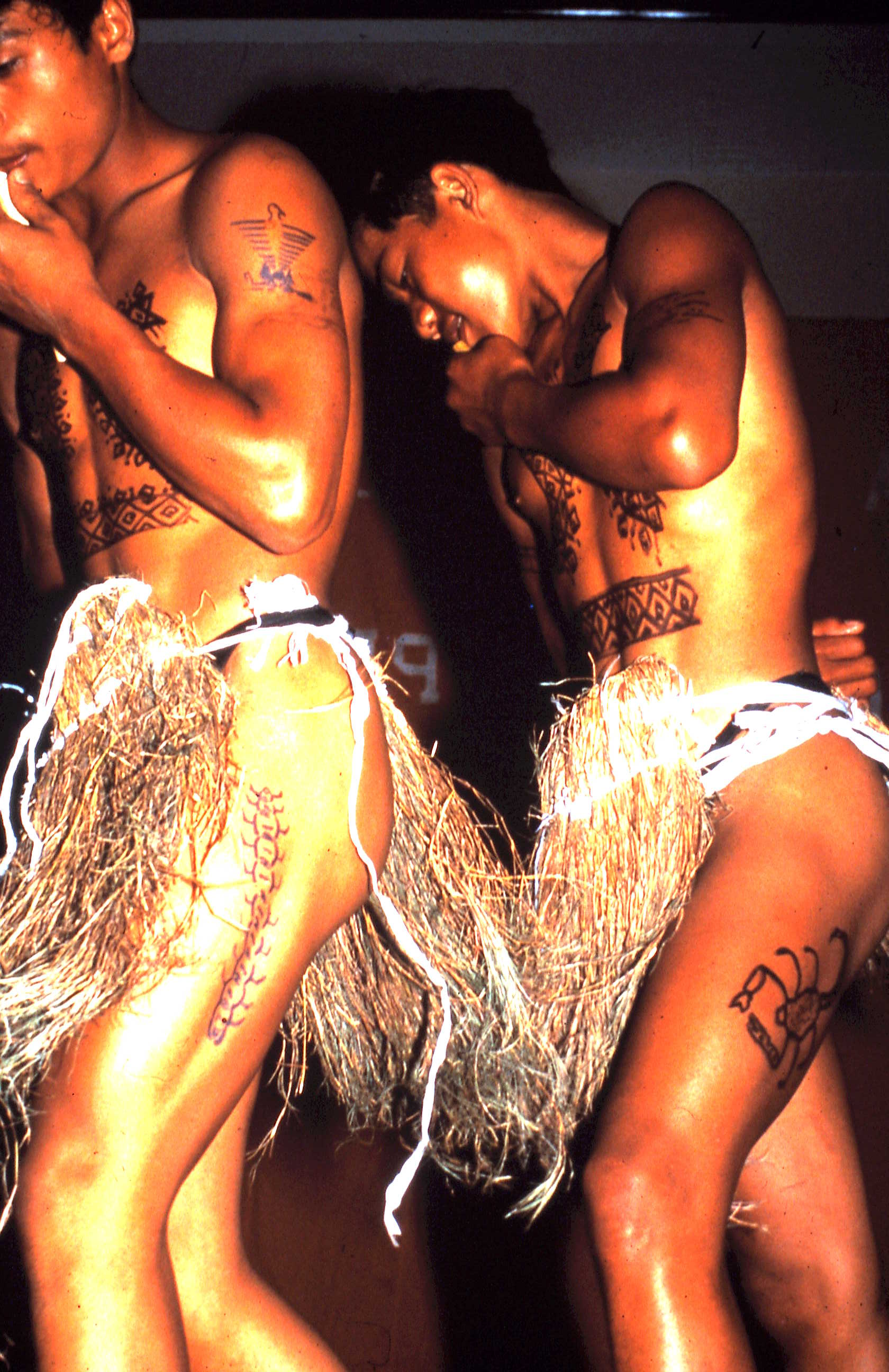 Traditional Kalinga dancers